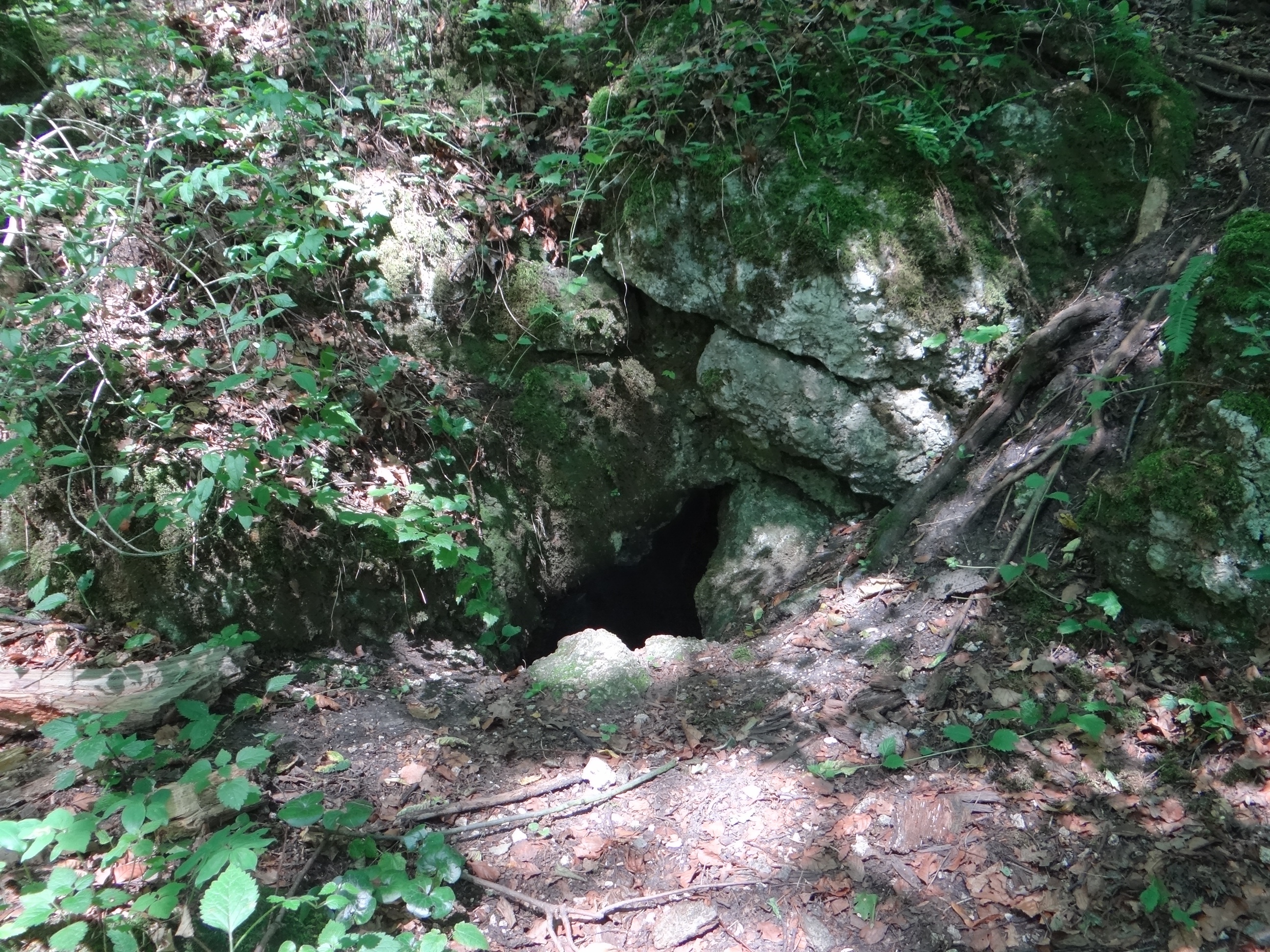 Jaskinia nad Miłaszówką w Dolinie Mniklowskiej